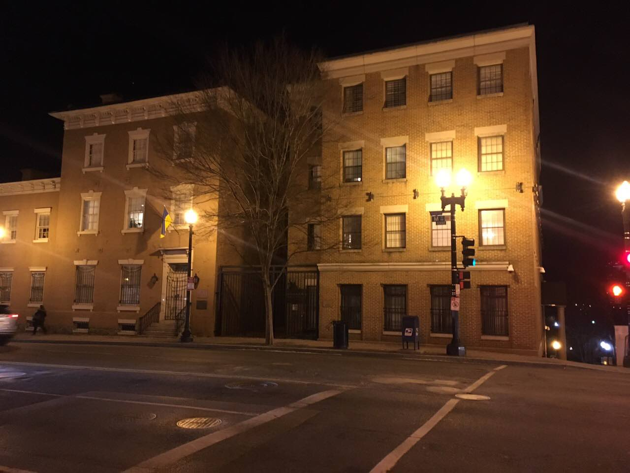 Посольство України в США